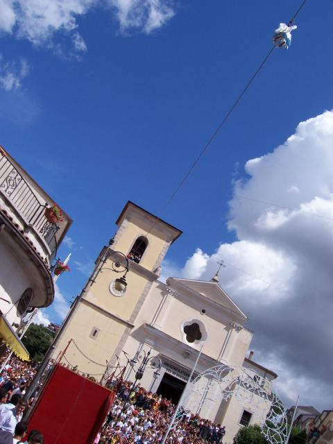 gopes, libera